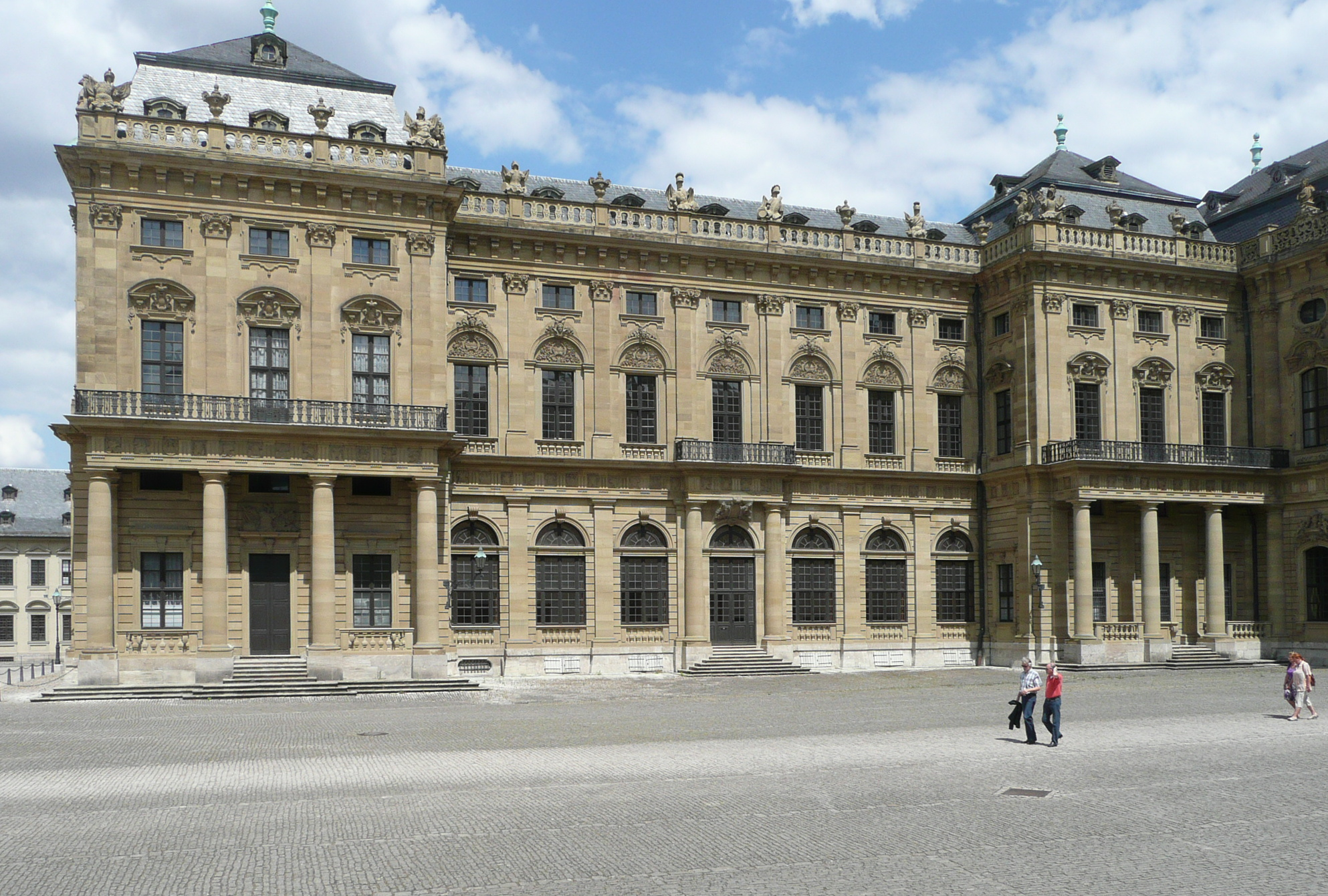 Würzburger Residenz, Nordseite des EhrenhofesThis is a photograph of an architectural monument.